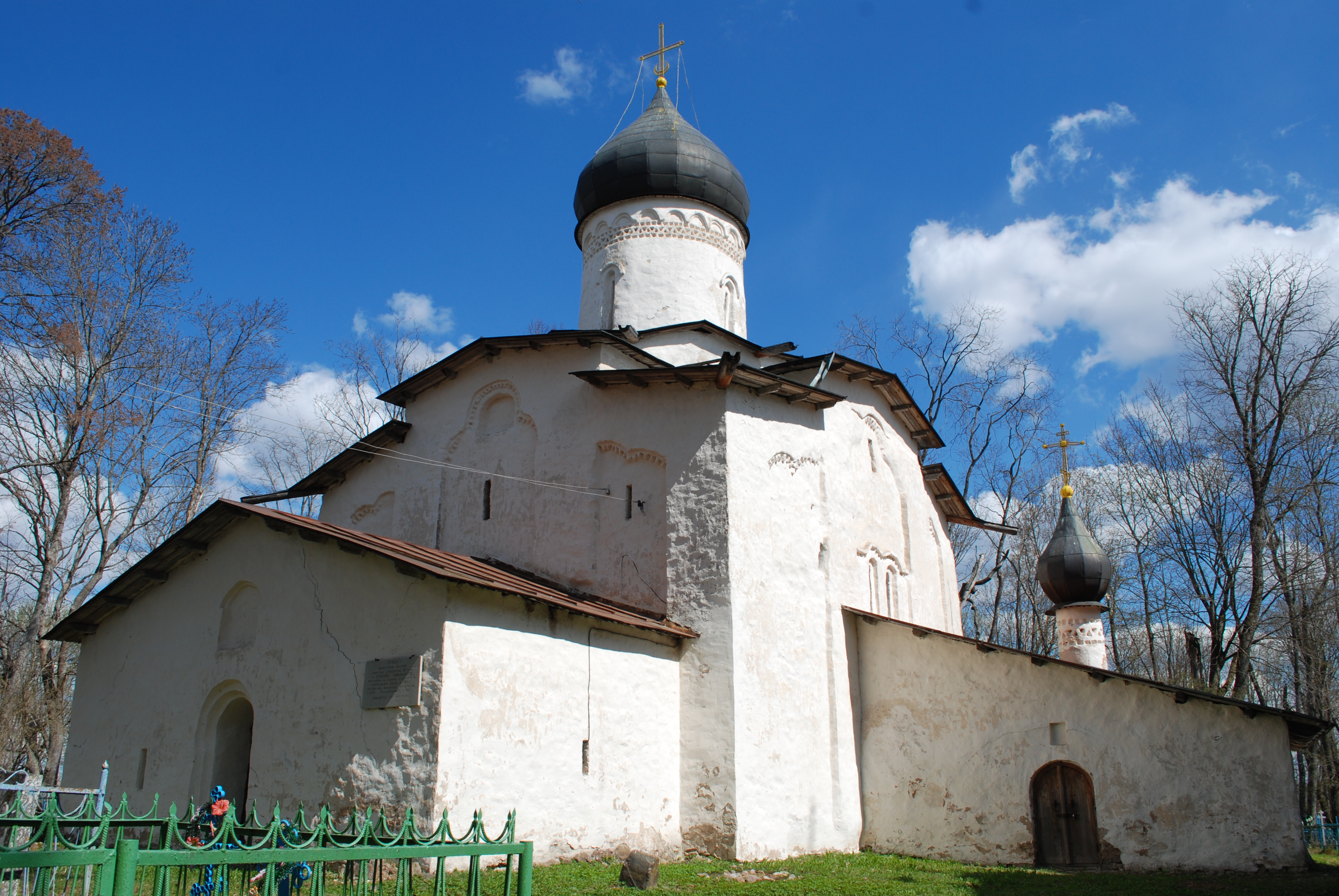 Церковь Успения в Мелетове с росписью (Псковская область, Порхов, село Мелетово, у Большого Загорья)